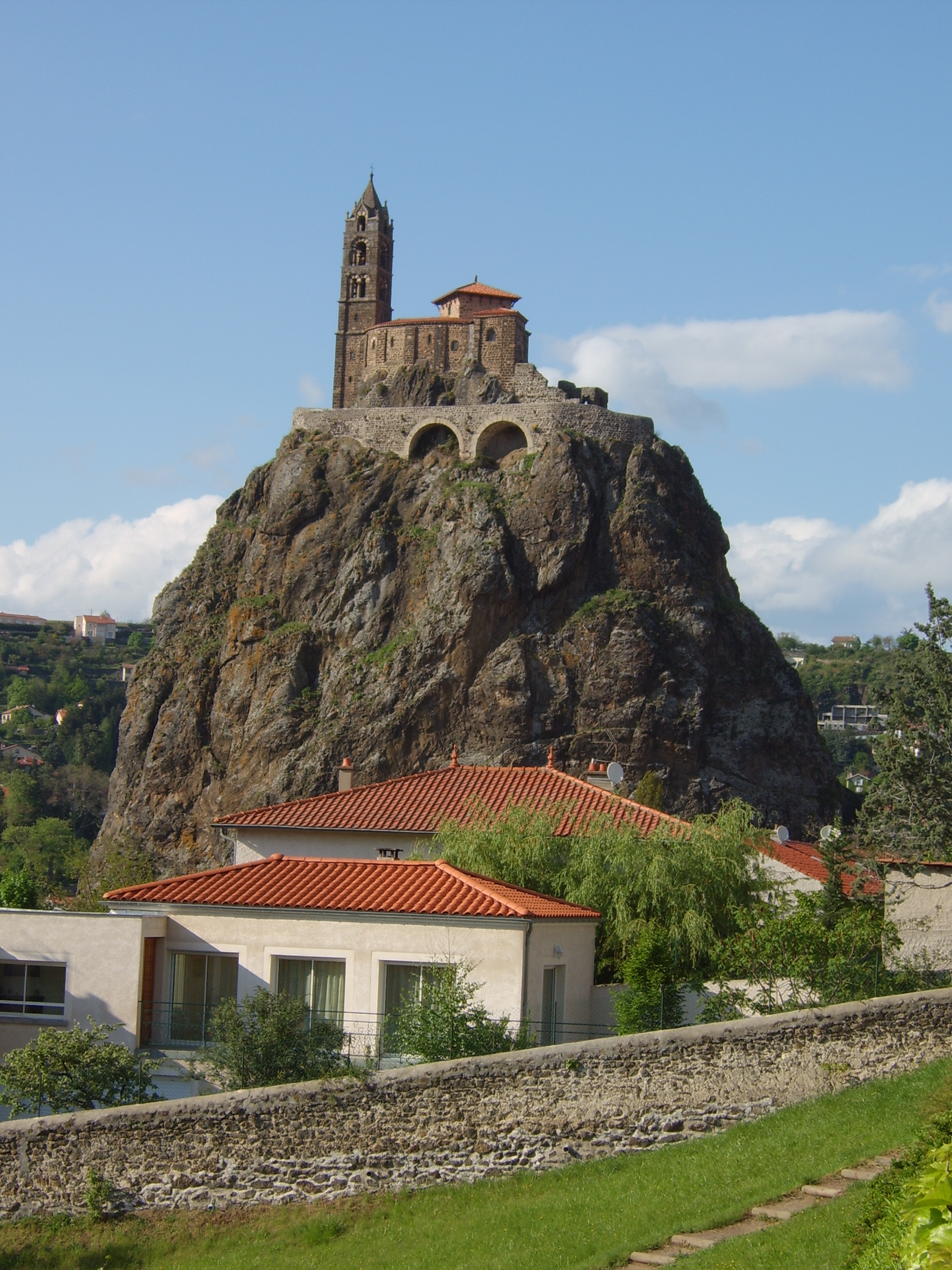 Le Puy - Saint Michel d'Aiguilhe Fotograf: Nicolai Schäfer am 13. Mai 2006